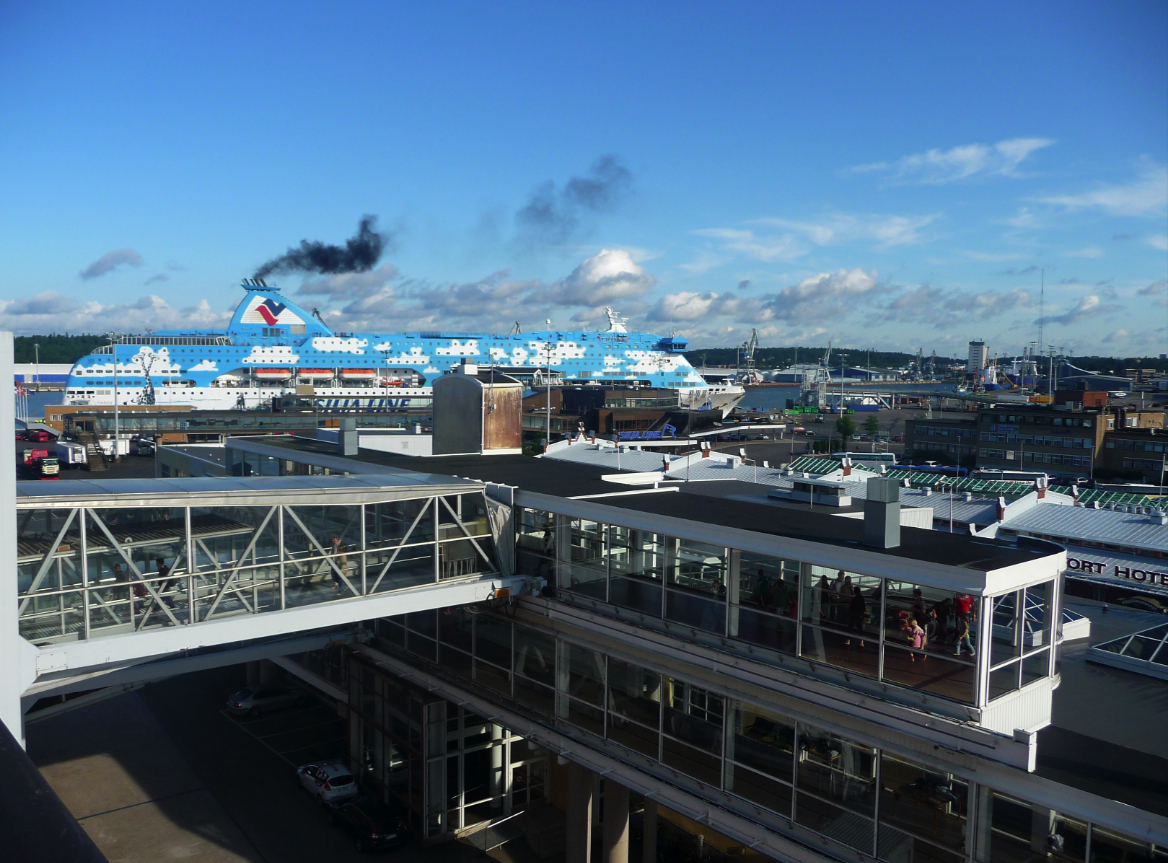 Turku harbour